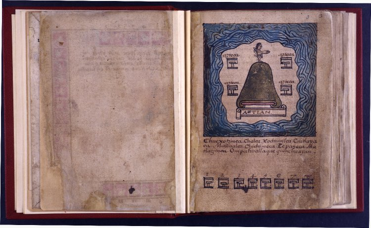 Esta imagen muestra una representación de la mítica Aztlán.